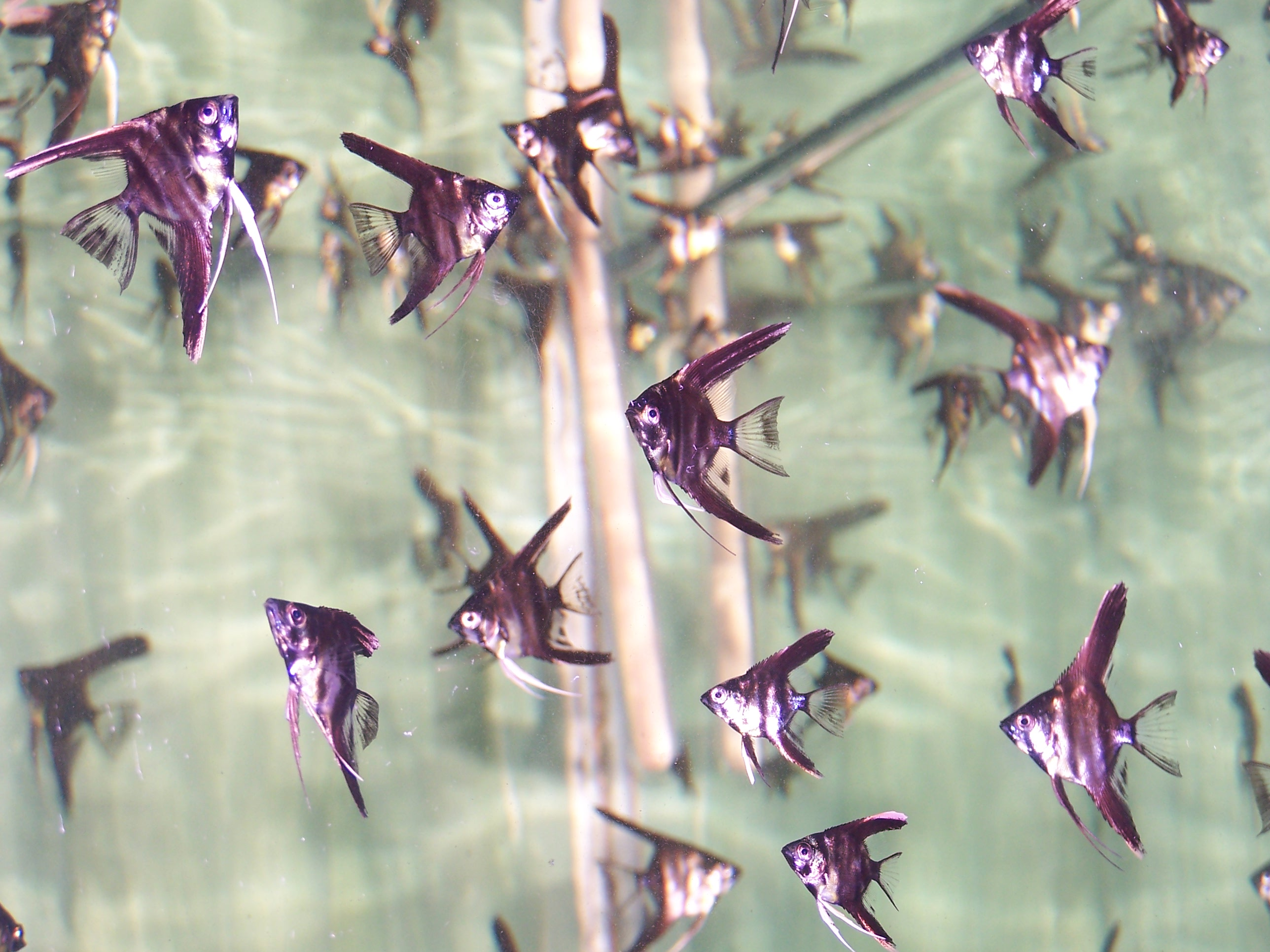 Narybek skalara - Pterophyllum scalare